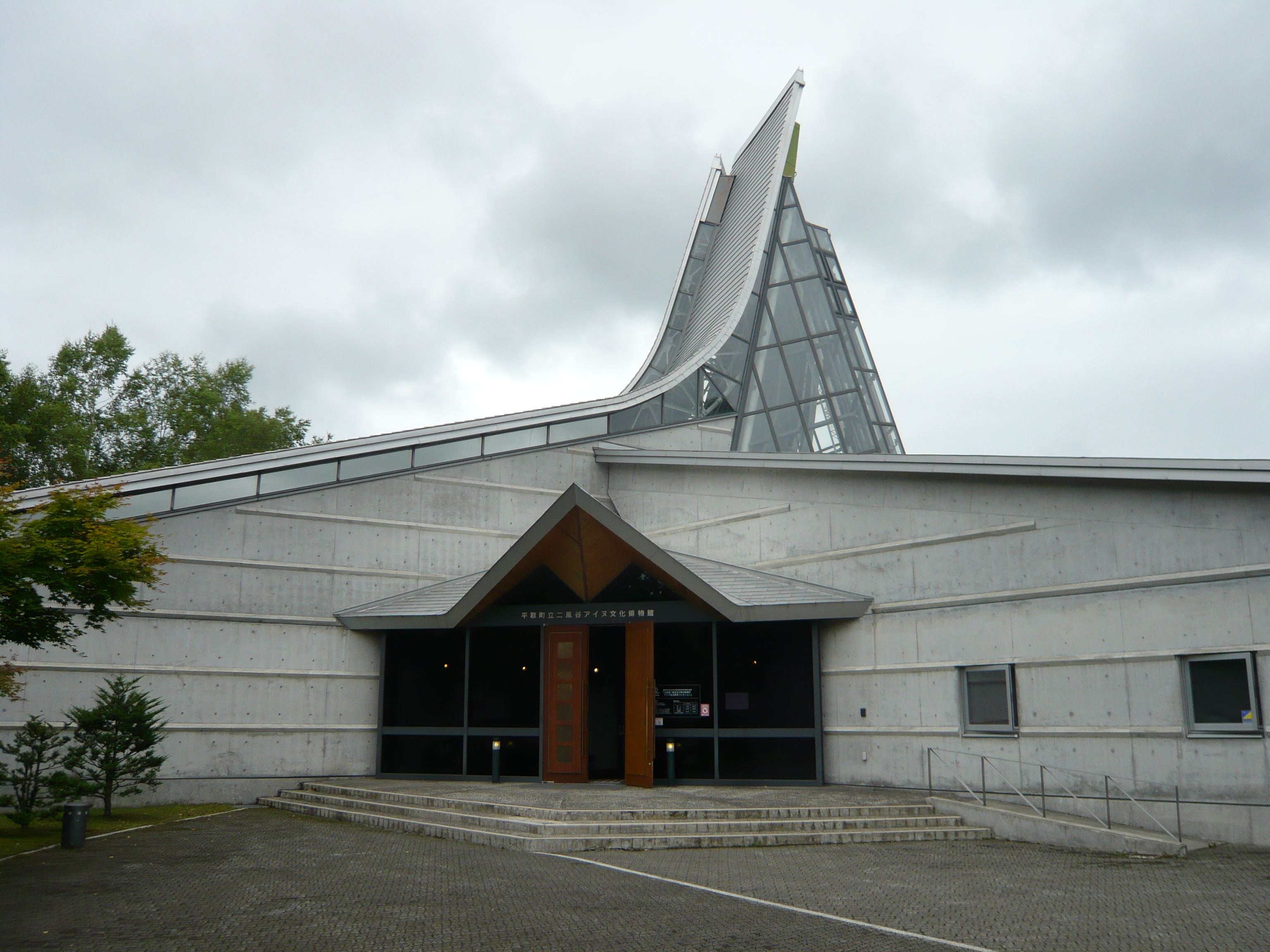 平取町立二風谷アイヌ文化博物館